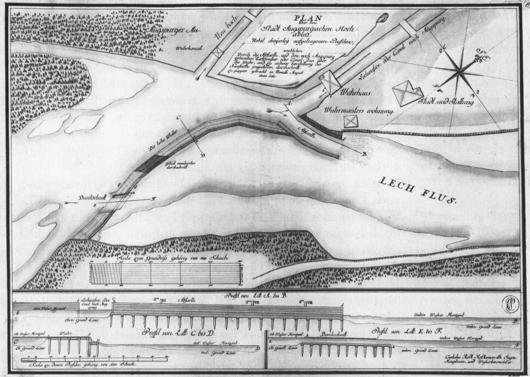 "Plan über den Stadt Augspurgischen Hochablas". Die Flussrichtung des Lechs ist von links nach rechts. Das Wehr ist schräg und in Flussrichtung gekrümmt in den Fluss eingebaut. Man sieht die Ableitung des Neubachs, der seit 1879 für den Betrieb des Hochablass-Wasserwerks angelegt wurde, dann den eigentlichen Zweck des Hochablasswehrs, die Ableitung des benötigten Wassers nach Augsburg ("Lechwasser oder Canal nach Augspurg",der Hauptstadtbach), sowie die am westlichen Ende des Wehrs eingebaute Floßgasse ("Abfarth", siehe auch Profil A-B), eine Rampe, über die Floße das Wehr passieren konnten. Das Wehr selbst (siehe Profil C-D) weist weiter östlich einen Durchlass auf (siehe Profil E-F).